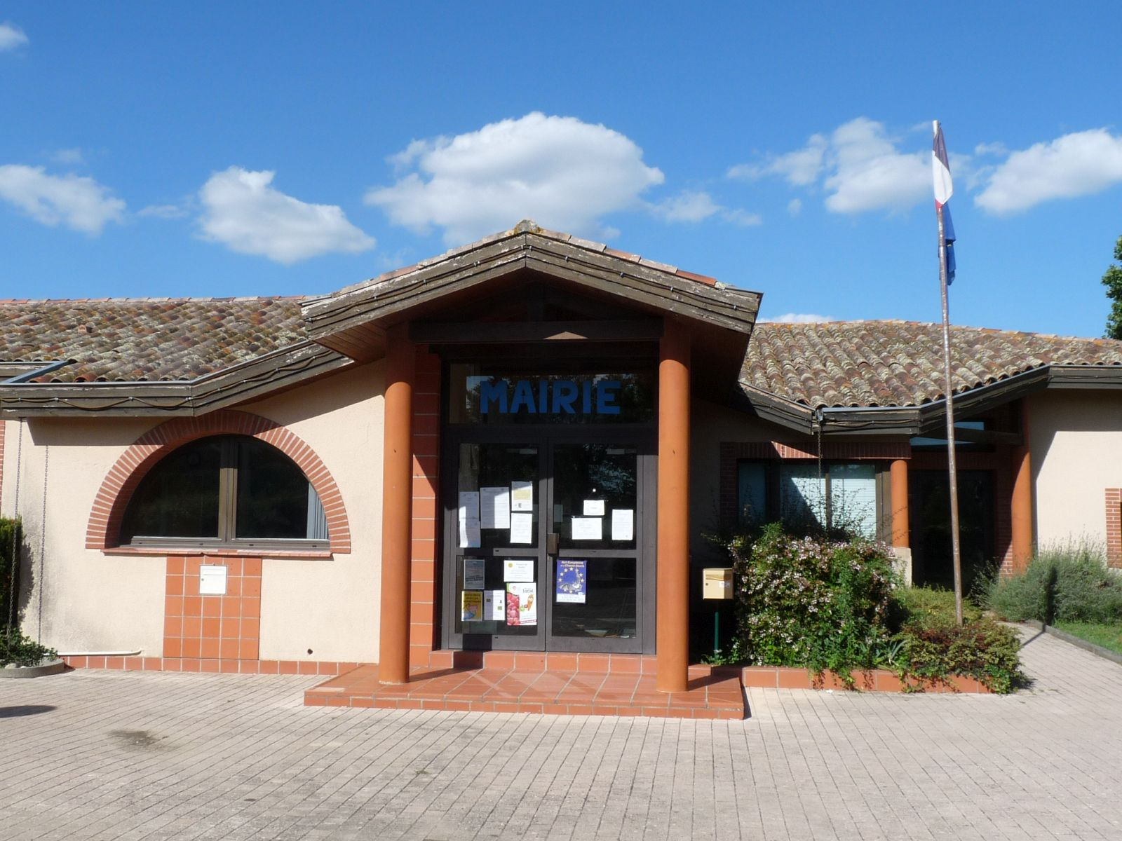 Mairie de Goyrans, Haute-Garonne, France